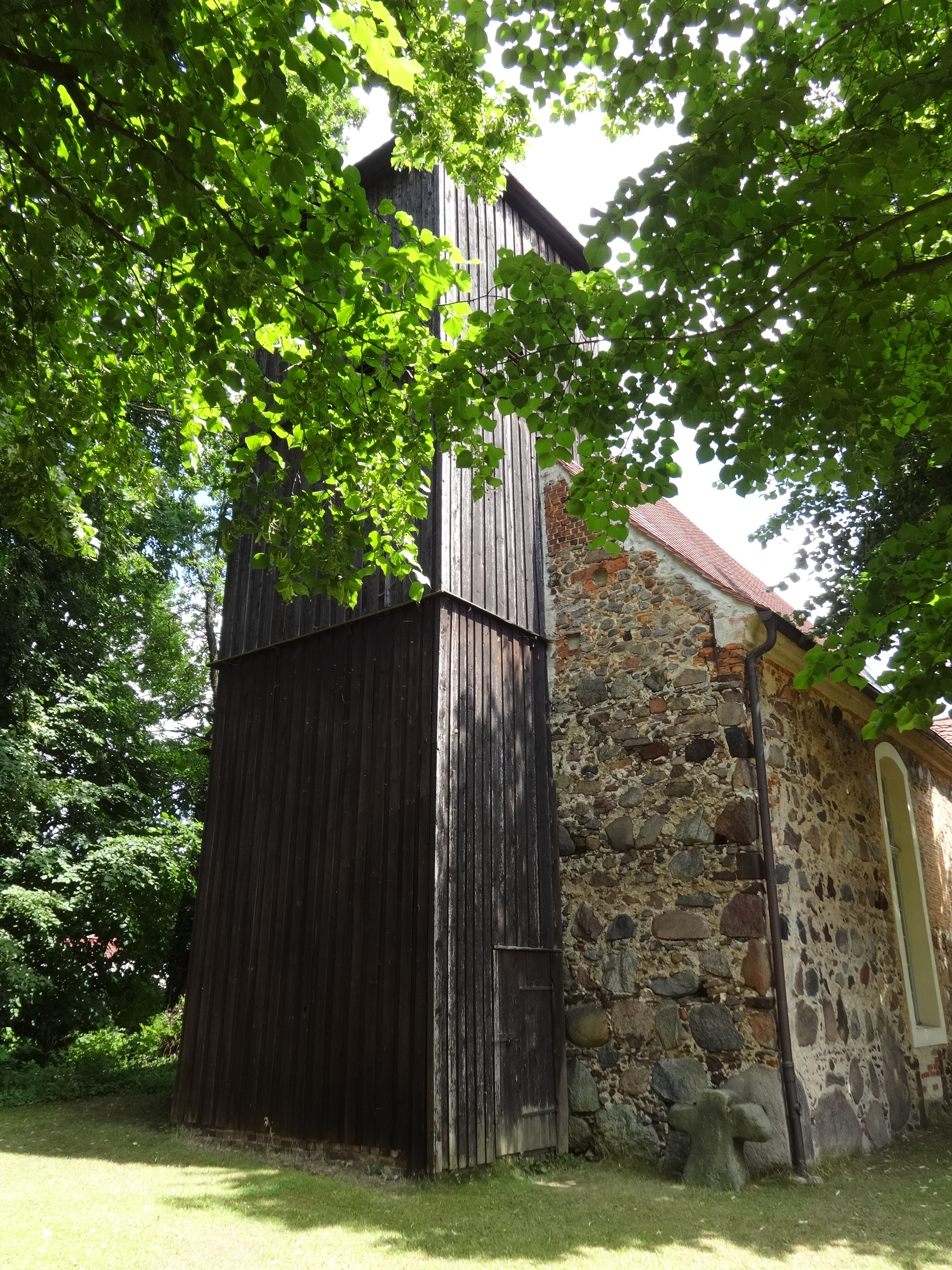 Die Dorfkirche in Zieckau wurde vermutlich im 14. Jahrhundert aus Feldsteinen errichtet. In seinem Innern befindet sich ein Kanzelaltar aus dem Jahr 1727, der ursprünglich in der Hospitalkapelle in Luckau stand.